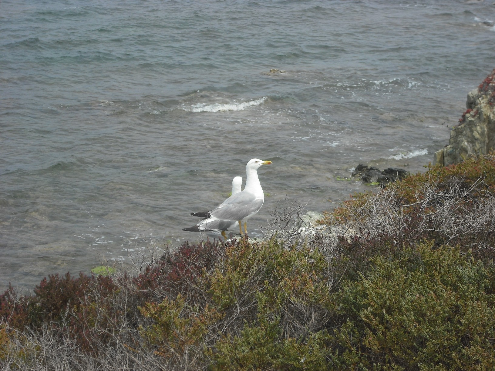 Gavines al Cap Falcon.